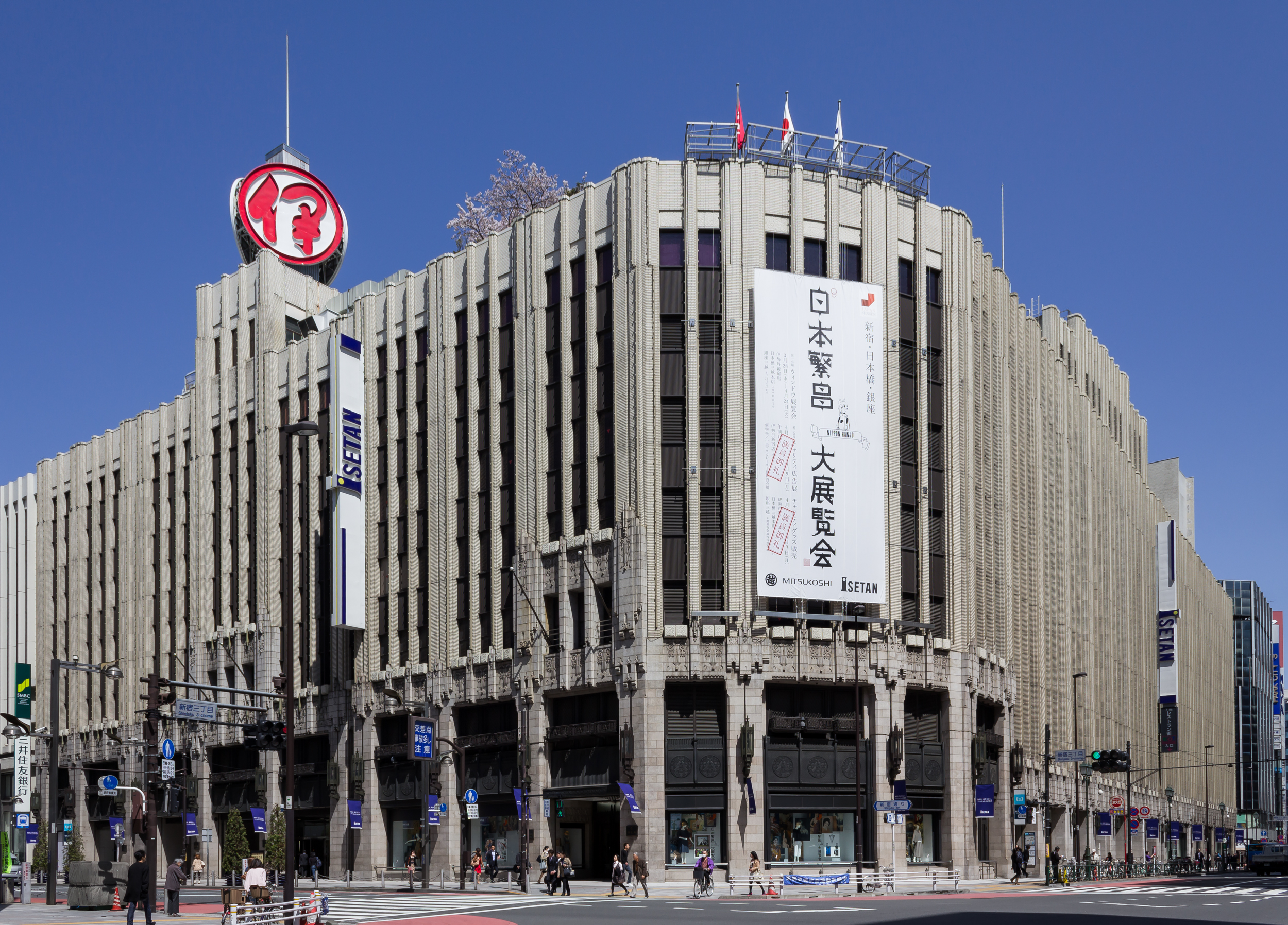 Isetan Shinjuku. 伊勢丹新宿本店(東京都の歴史的建造物)